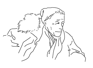 Portrait de Paul-Émile Victor